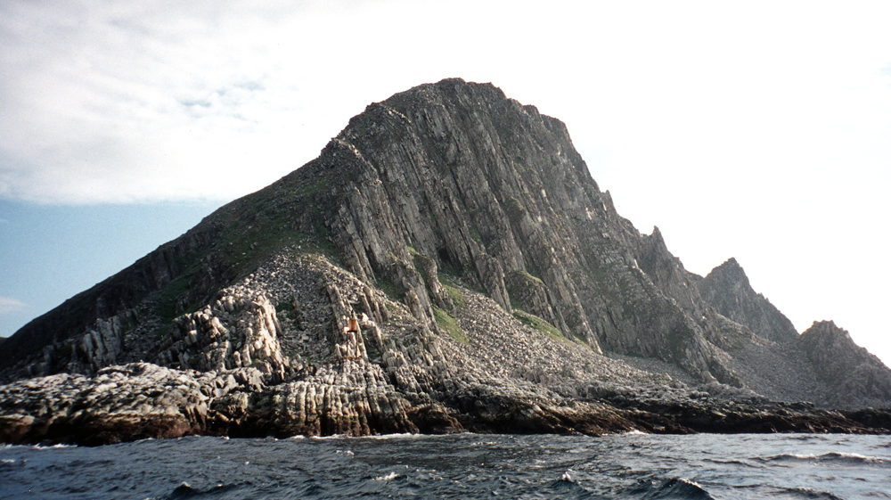 Das nördlichste Ende von Europas Festland auf der norwegischen Halbinsel Nordkinn: Der Fels Kinnarodden auf 71° 08' 01" n. Br. Foto: Thomas Bujack